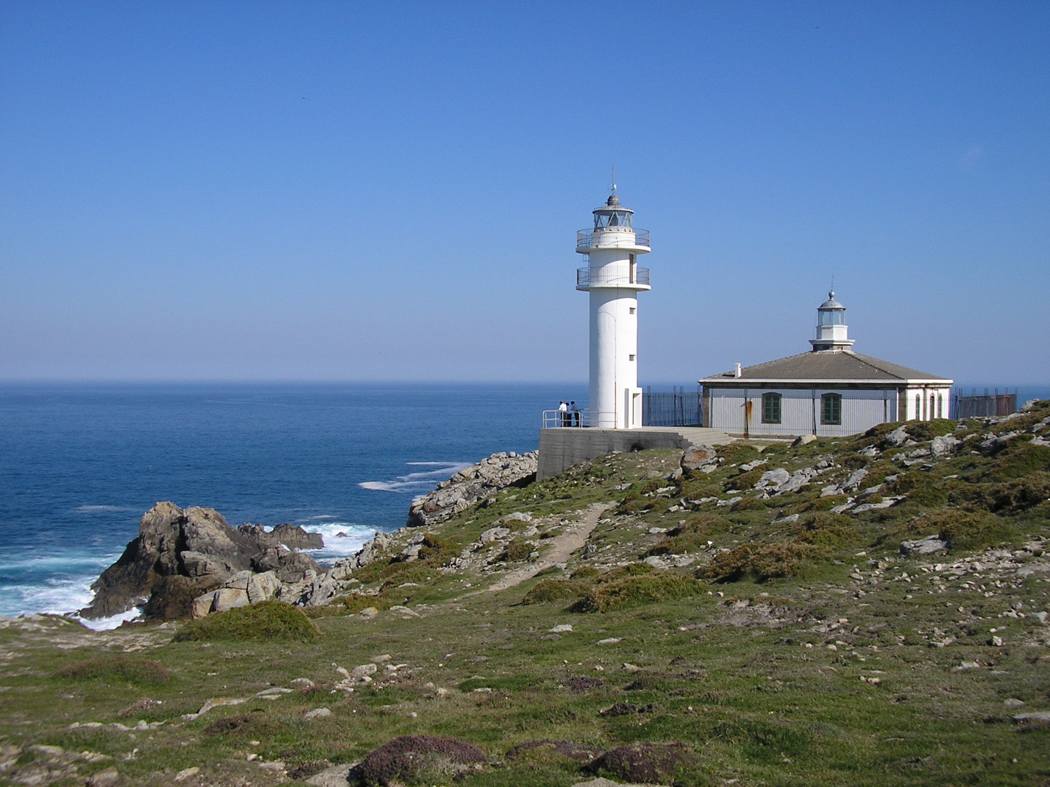 Cabo Touriñán in Nordspanien (Galicien). Der westlichste Punkt des spanischen Festlandes. Auf einem Plateau 50 Meter über dem Meer sind ein alter Leuchtturm von 1898 und sein moderner Nachfolger von 1981. Die Reichweite des 11 m hohen neuen Turmes beträgt bis zu 20 Seemeilen (37 km)